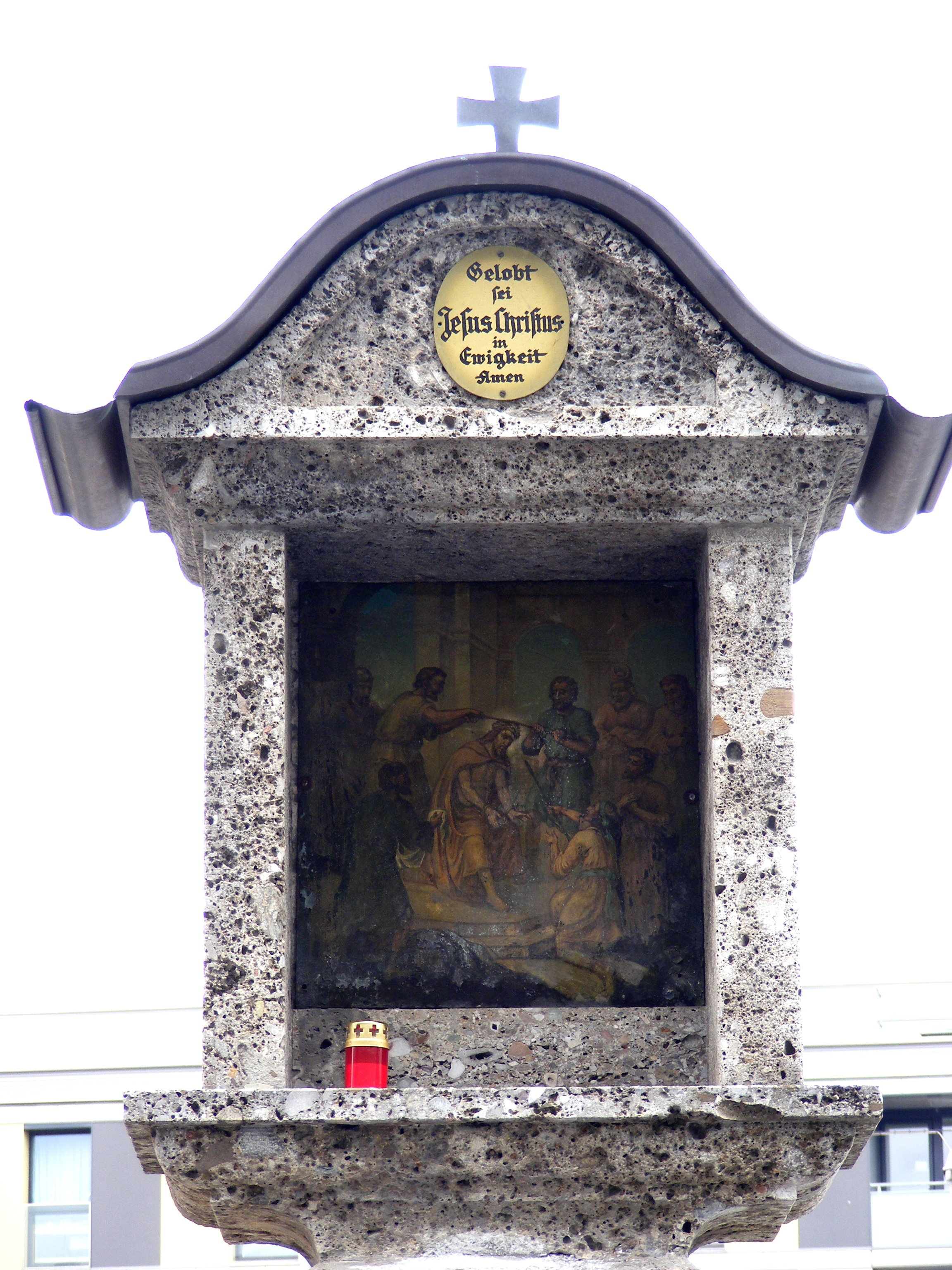 Bildstock VIII der 15 Geheimnnissäulen auf den Weg nach Maria Plain, Salzburg, Österreich